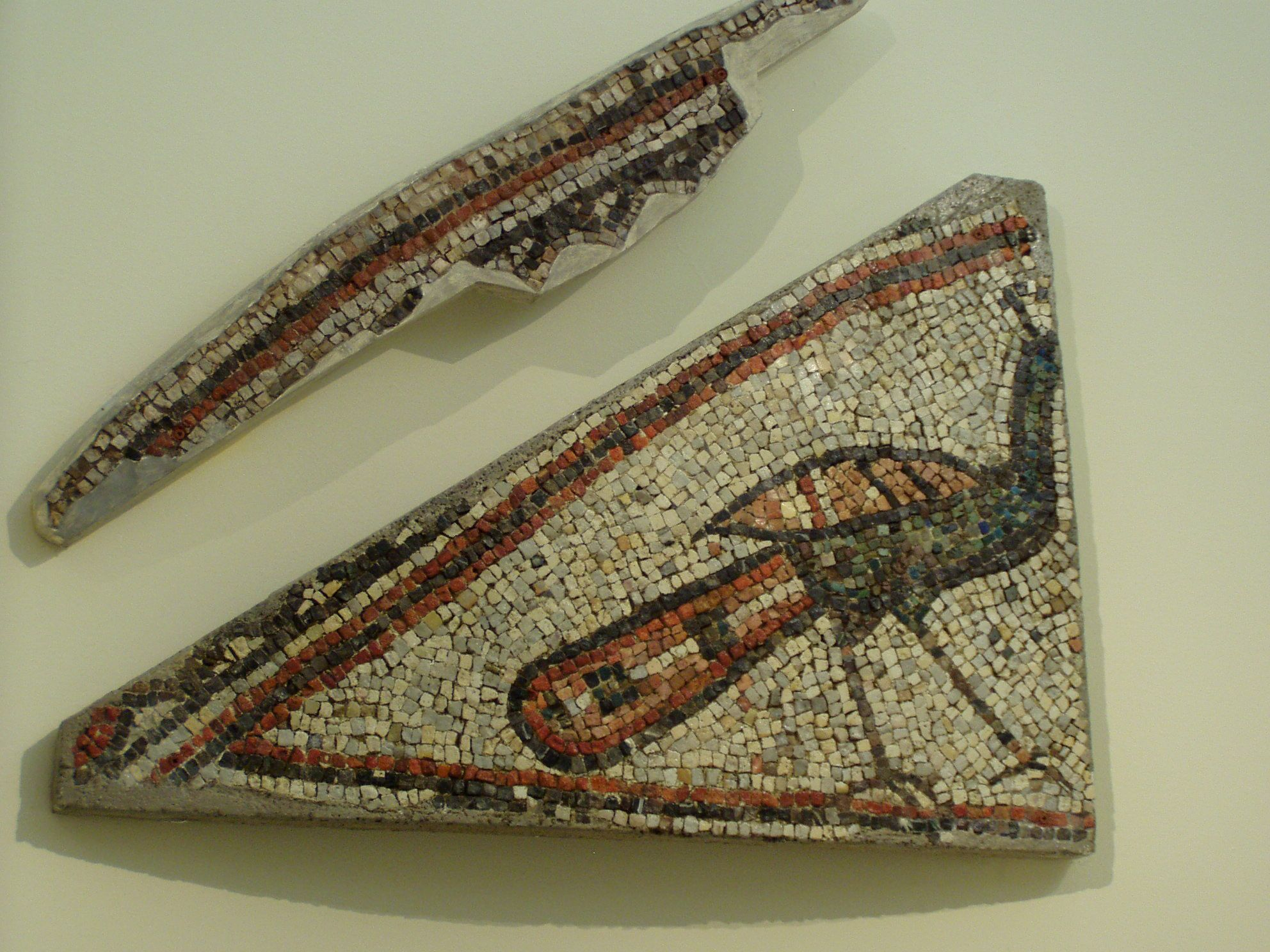 Hemmaberg, Carinthia. Östliche Doppelkirche, Memorialkirche, Mosaik mit Pfauenmosaik aus der Apsis